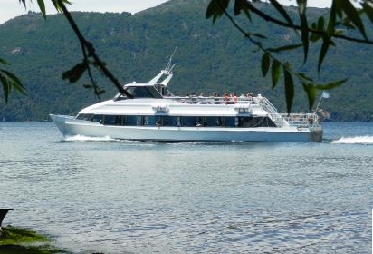 Lancha colectiva "Mari Mari" yendo de Quila Quina hasta Hua Hum